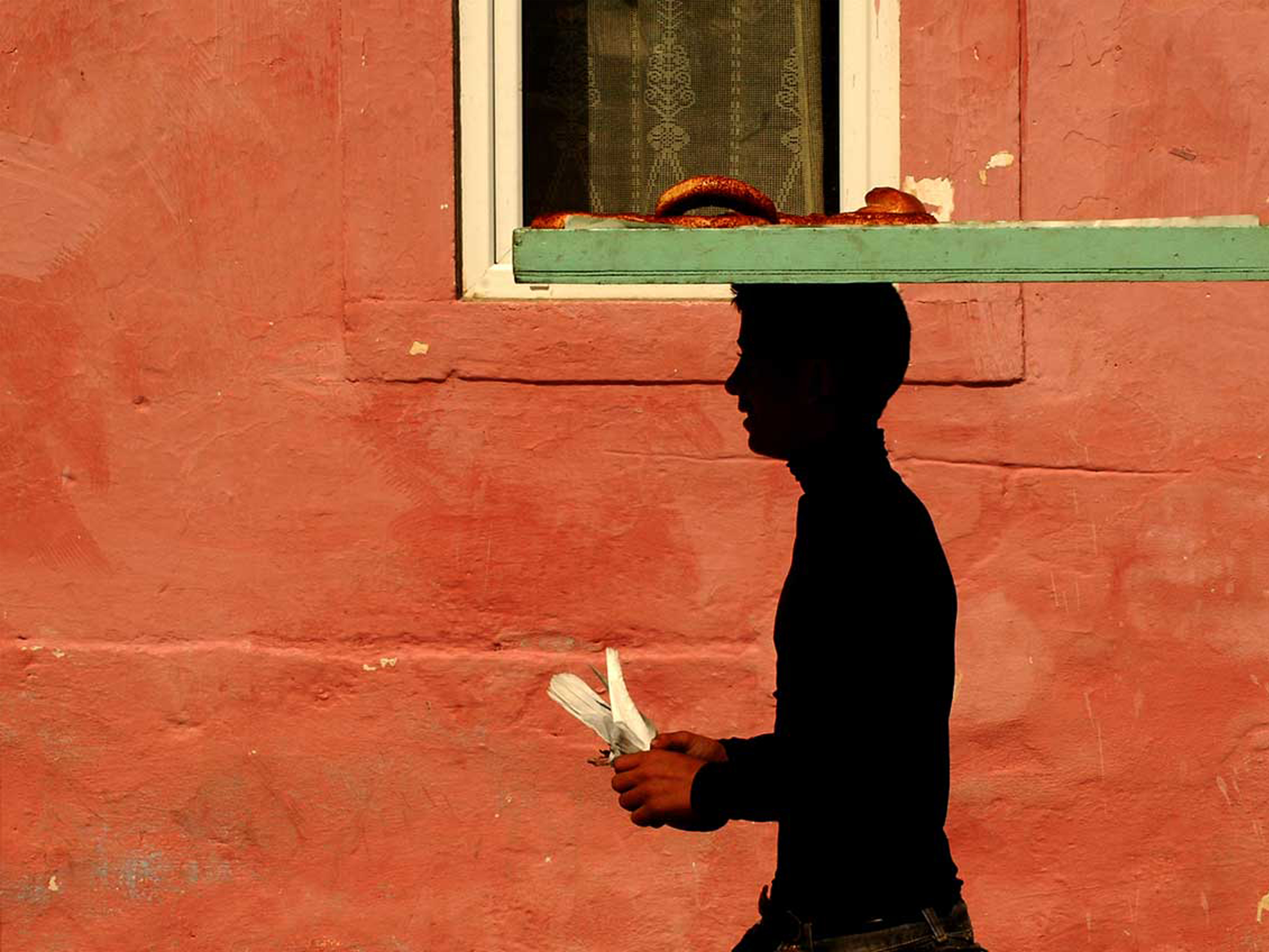 National Geographic Human Category 2. World Winner